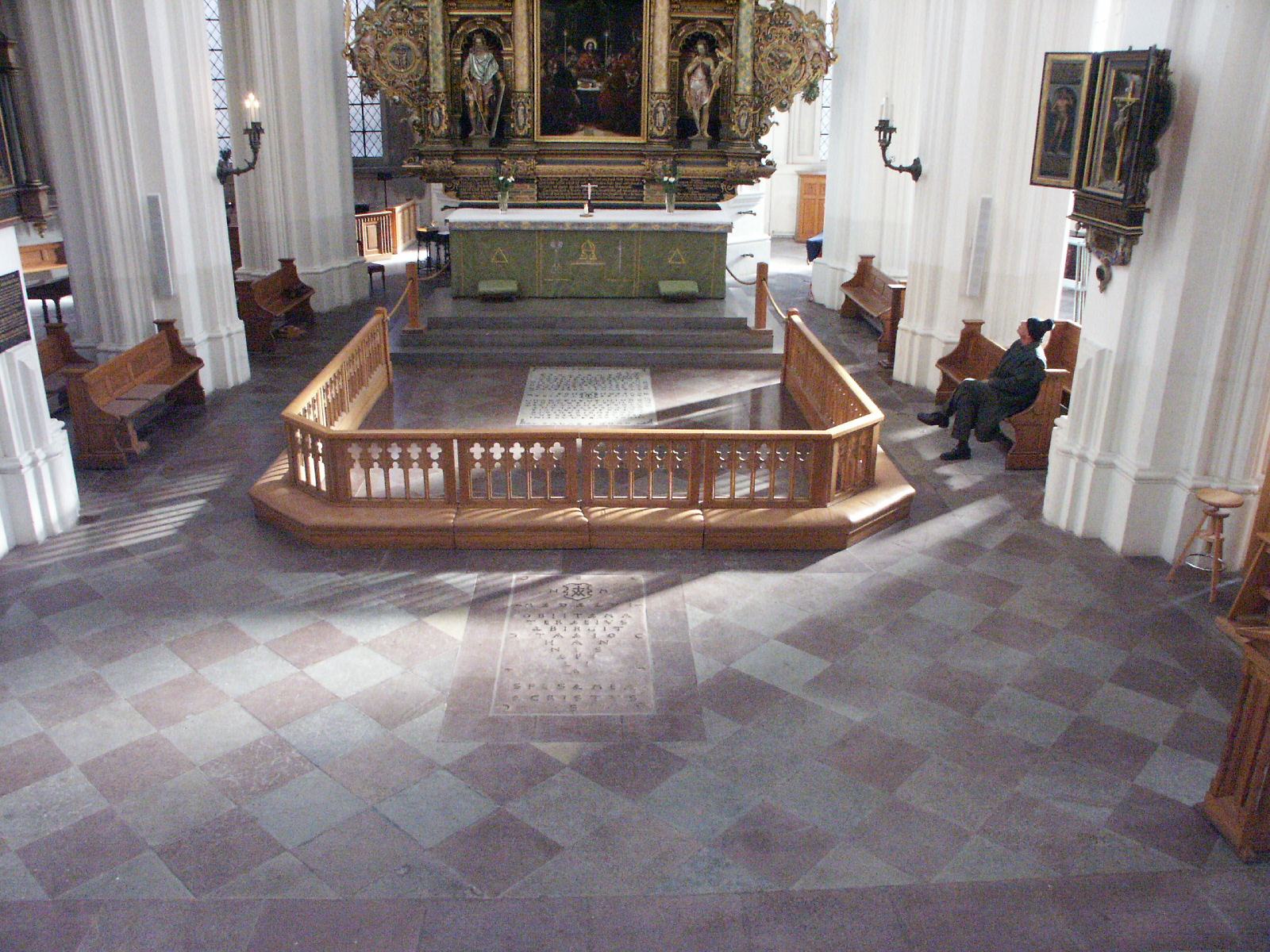 Reformatorn Claus Mortensens och hans mors garvsten i Malmö St Petri, Sverige.